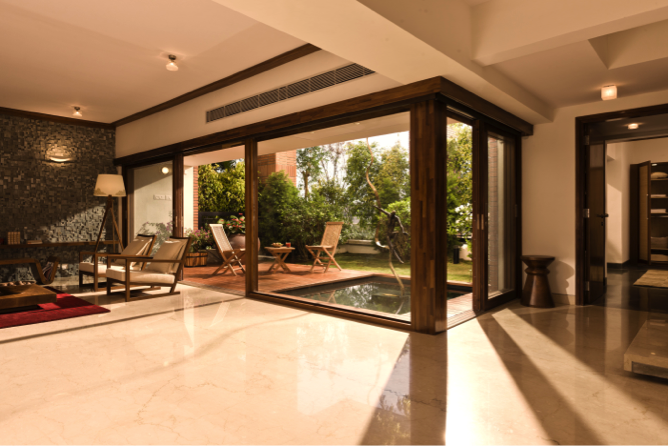 The Magic Faraway Tree, Kanakapura Road, Bangalore